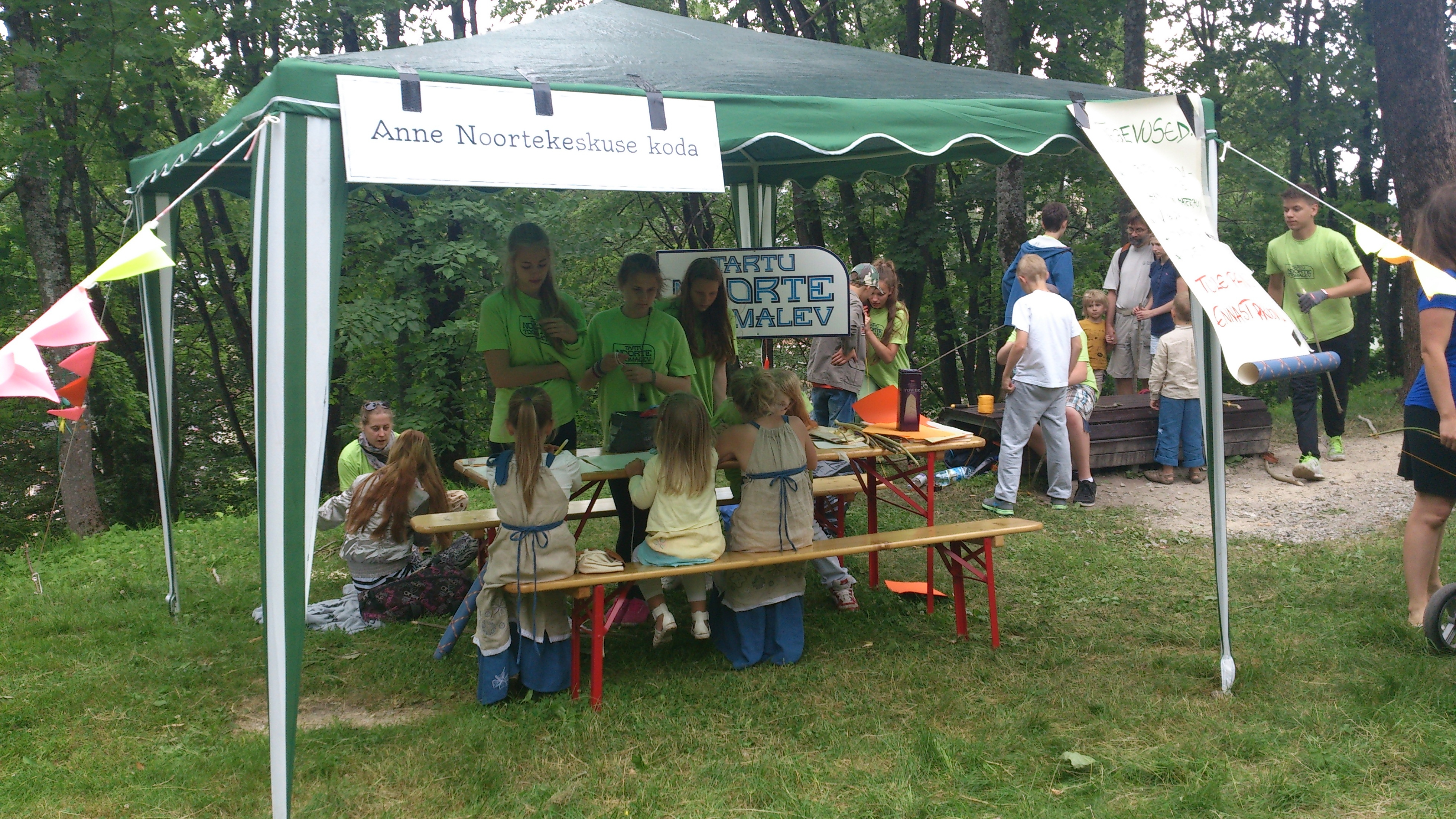 Anne Noortekeskus Tartu hansapäevadel 2014